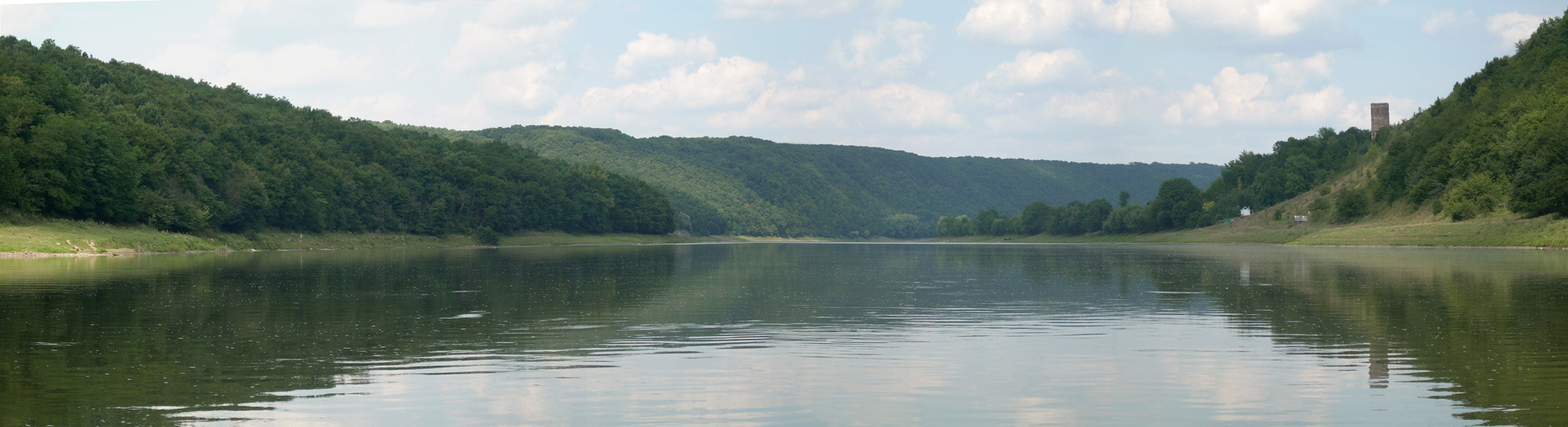 Руїни замку Беньовського 1660 рік с. Раковець Городенківський район